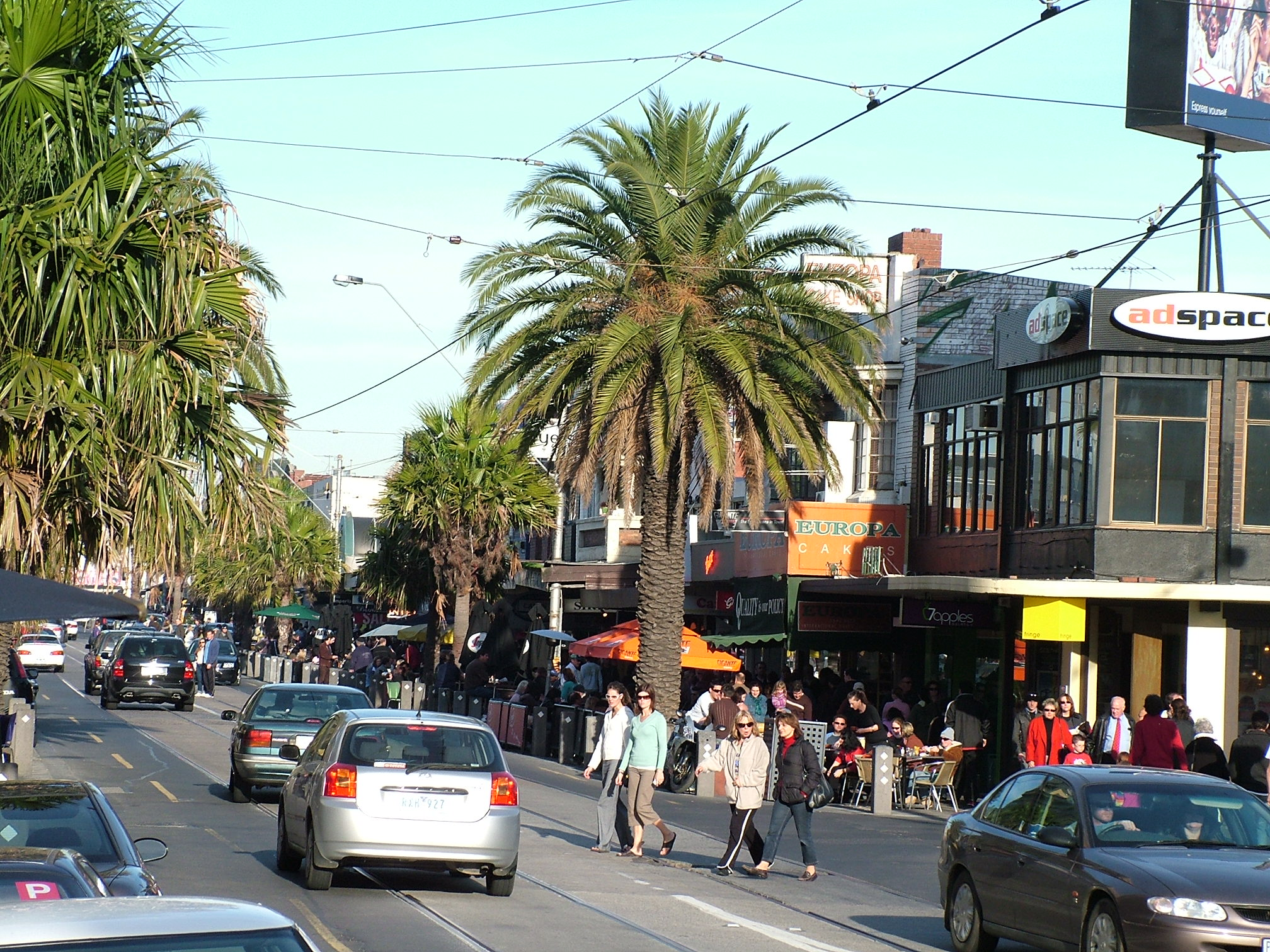 Midtvinterdøgn i Melbourne 2005. Jarle Andersen